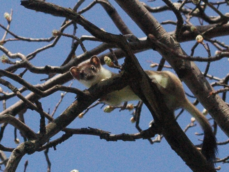 Mustela erminea, Zámčisko, Slovakia